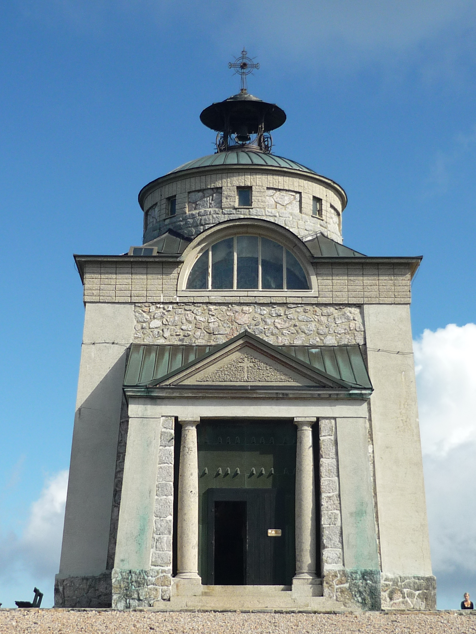 Das Elisabethkirchlein auf dem Hochplateau des Schneebergs.